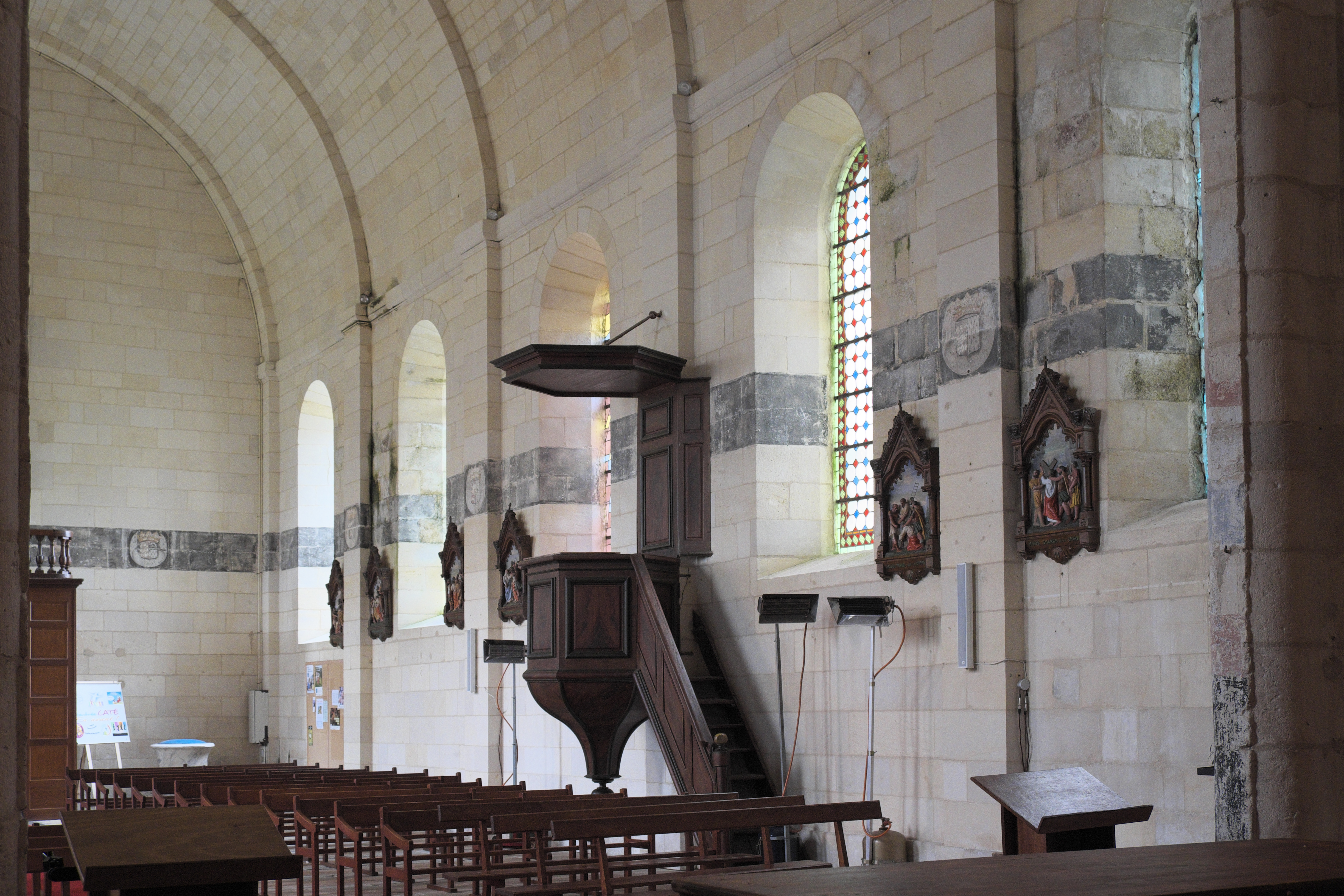 Katholische Kirche Saint-Pierre in Soubise im Département Charente-Maritime (Nouvelle-Aquitaine/Frankreich), Trauerbänder (litres funéraires) an der Innenwand